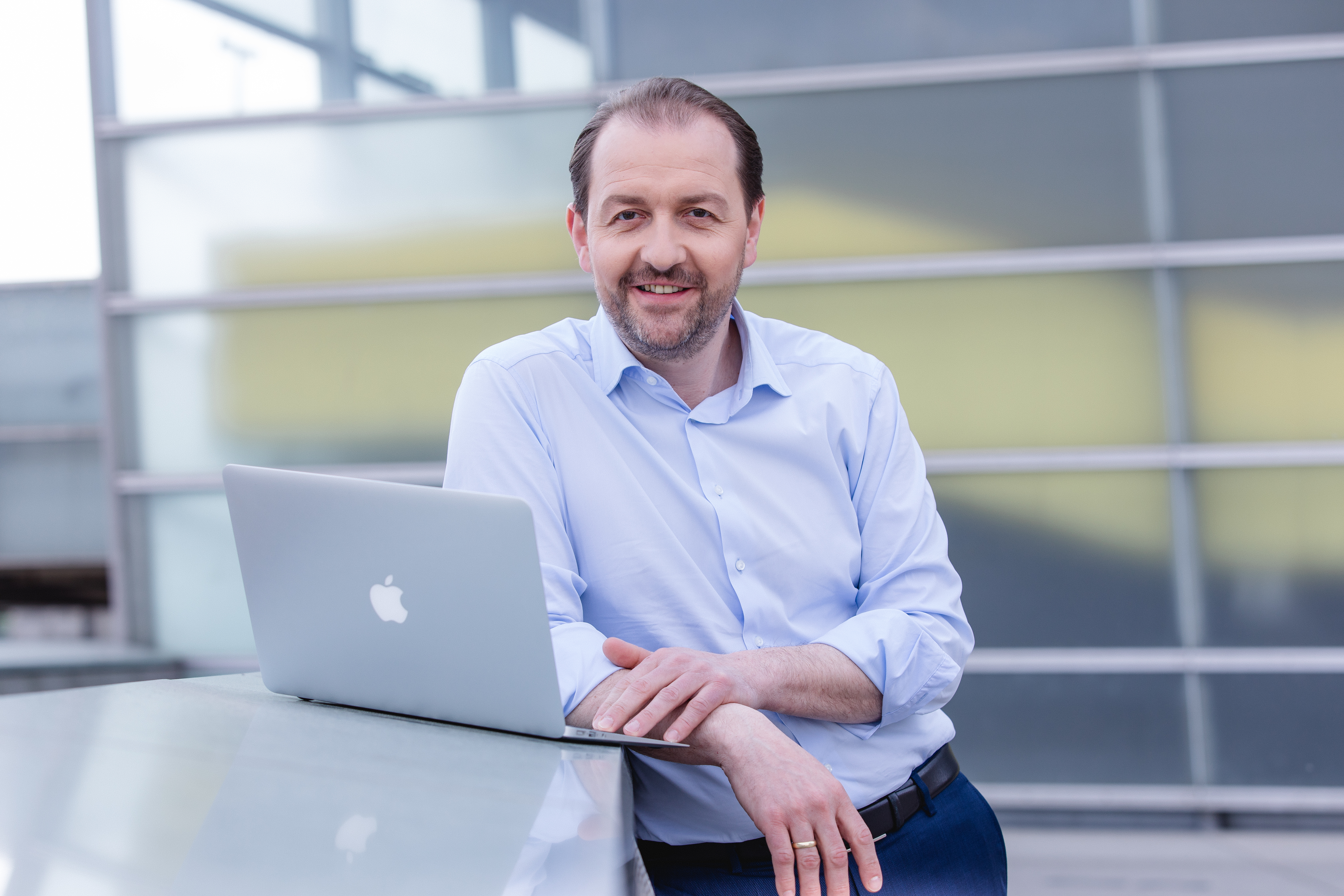 Vize-Bürgermeister Bernhard Baier (2017)